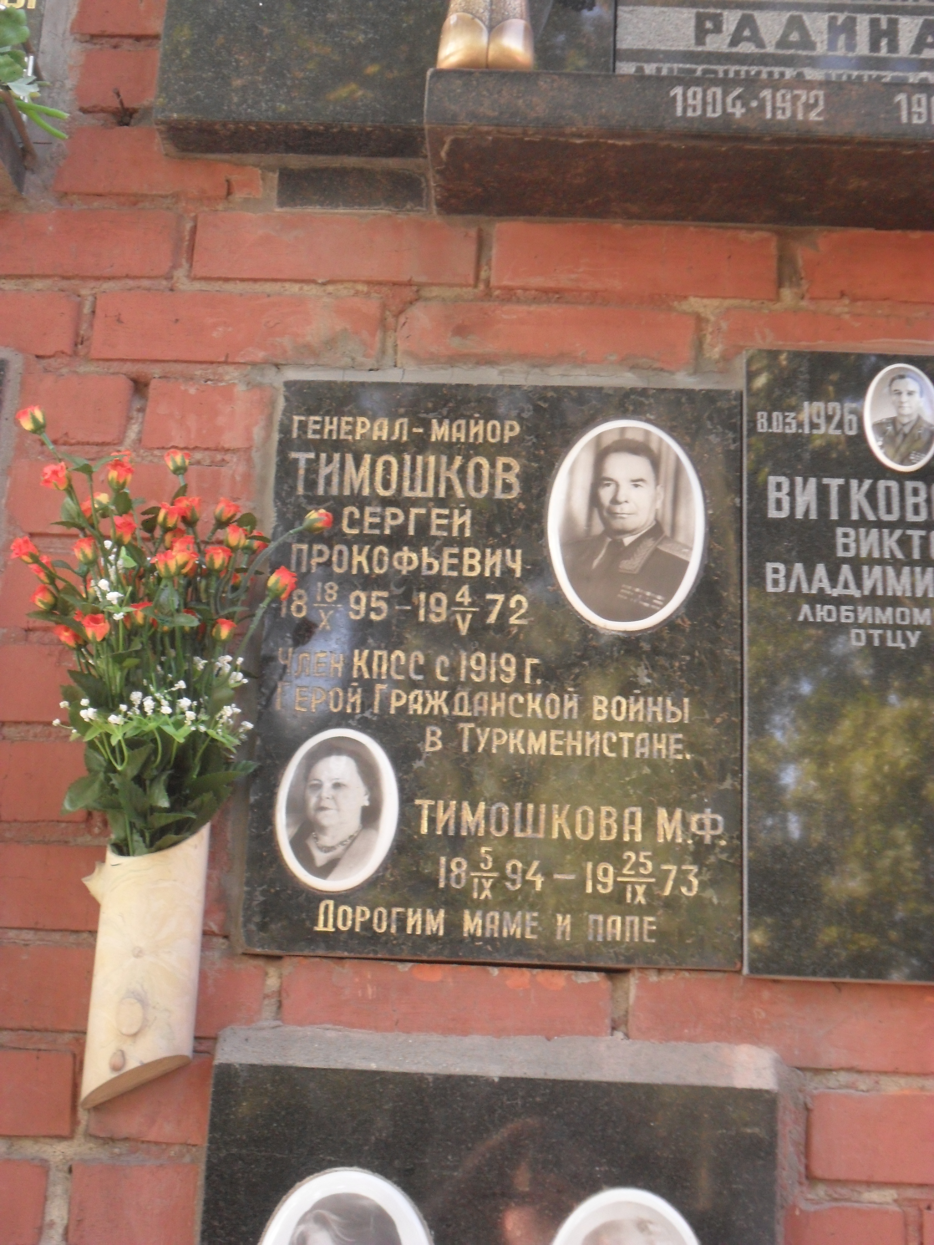 Плита колумбария генерал-майора Сергея Тимошкова на Новодевичьем кладбище Москвы.